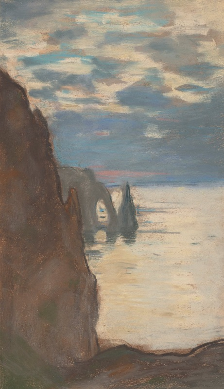 Etude au pastel de la falaise d'Etretat aval